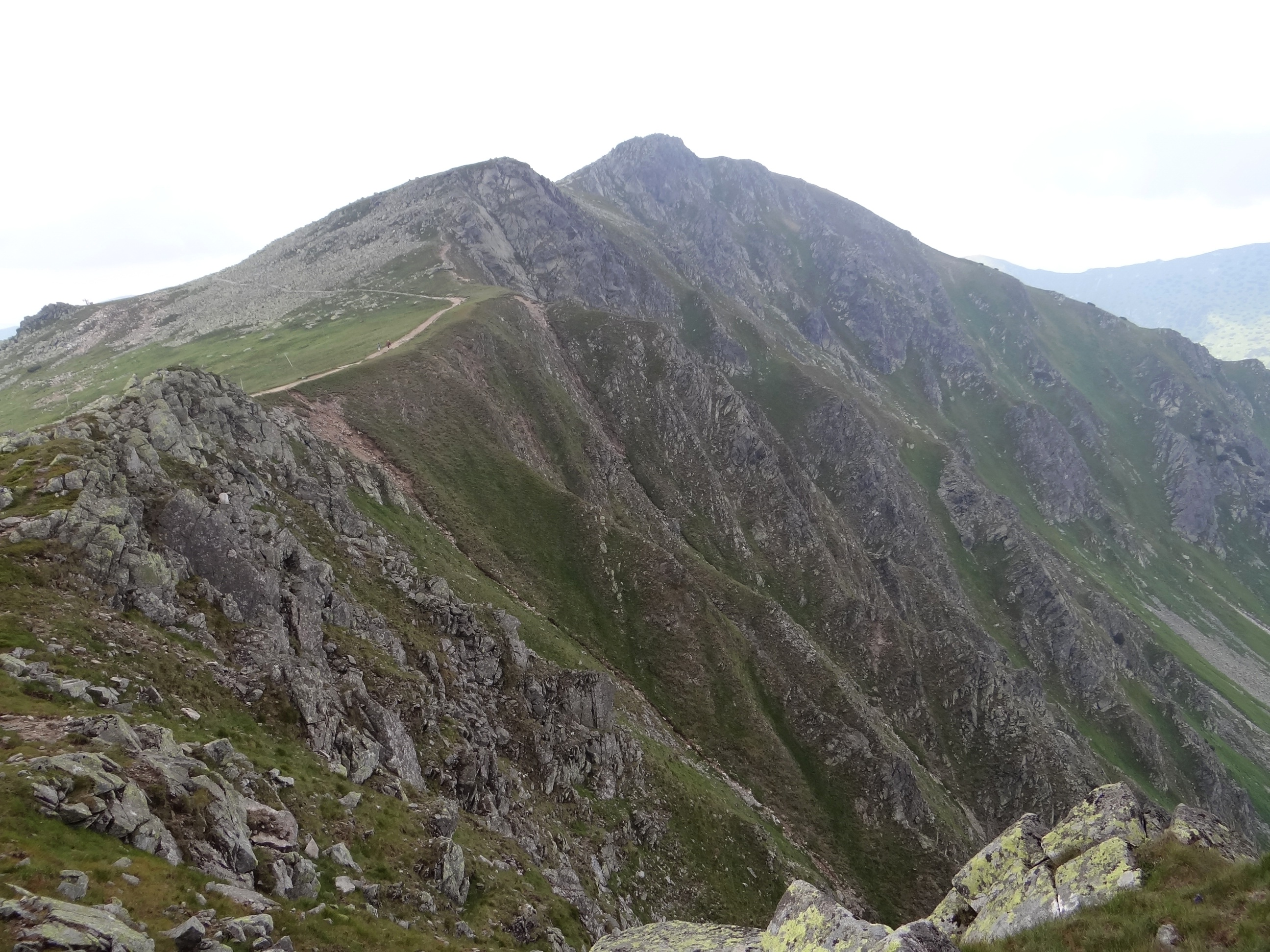 Dereše, wiew from Chopok